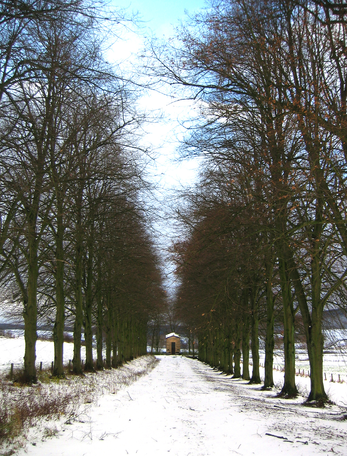 Blick vom Eingang der Lindenallee zum Carl-Gustav-Rommenhöller-Denkmal bei Herste in Bad Driburg, Deutschland.